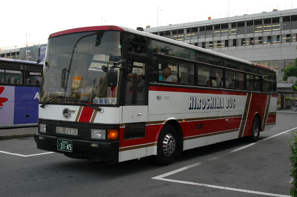 広島駅新幹線口にて 2005-9-20